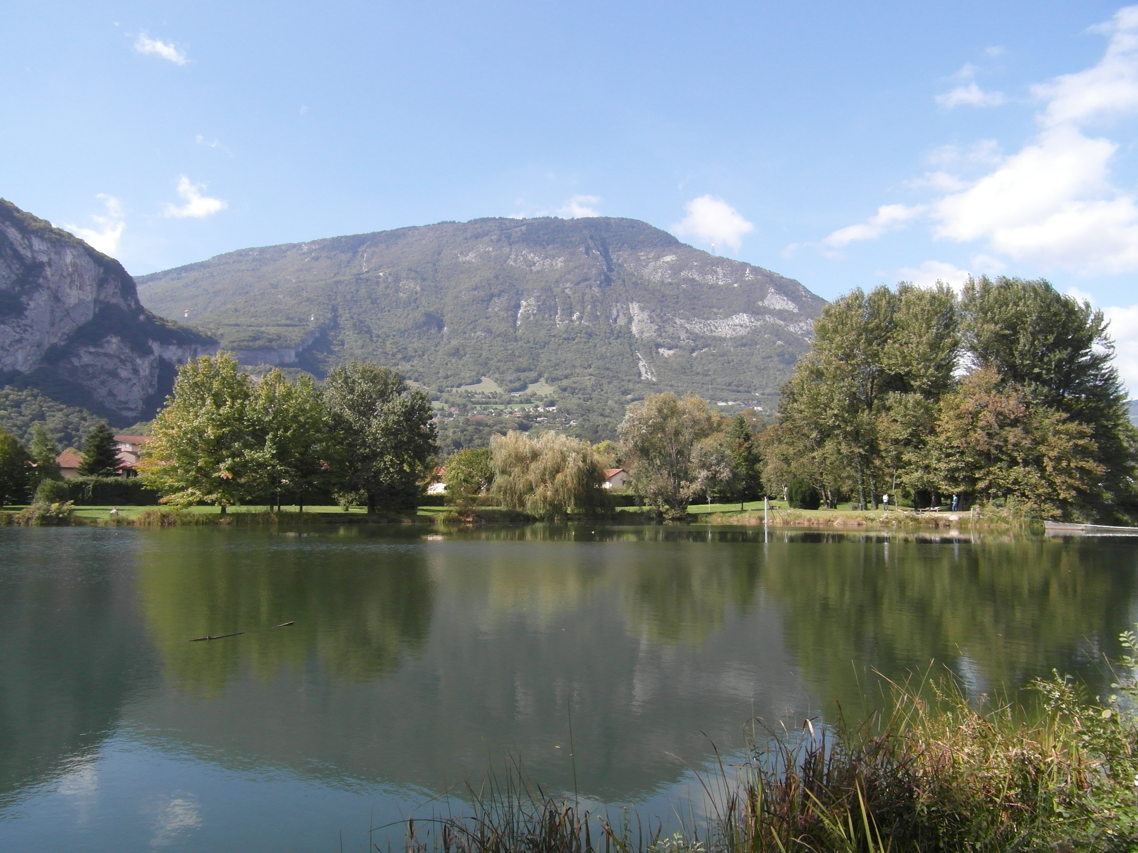 Parc de l'Ovalie à Sassenage